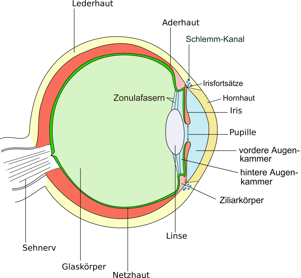 Anatomie des Auges